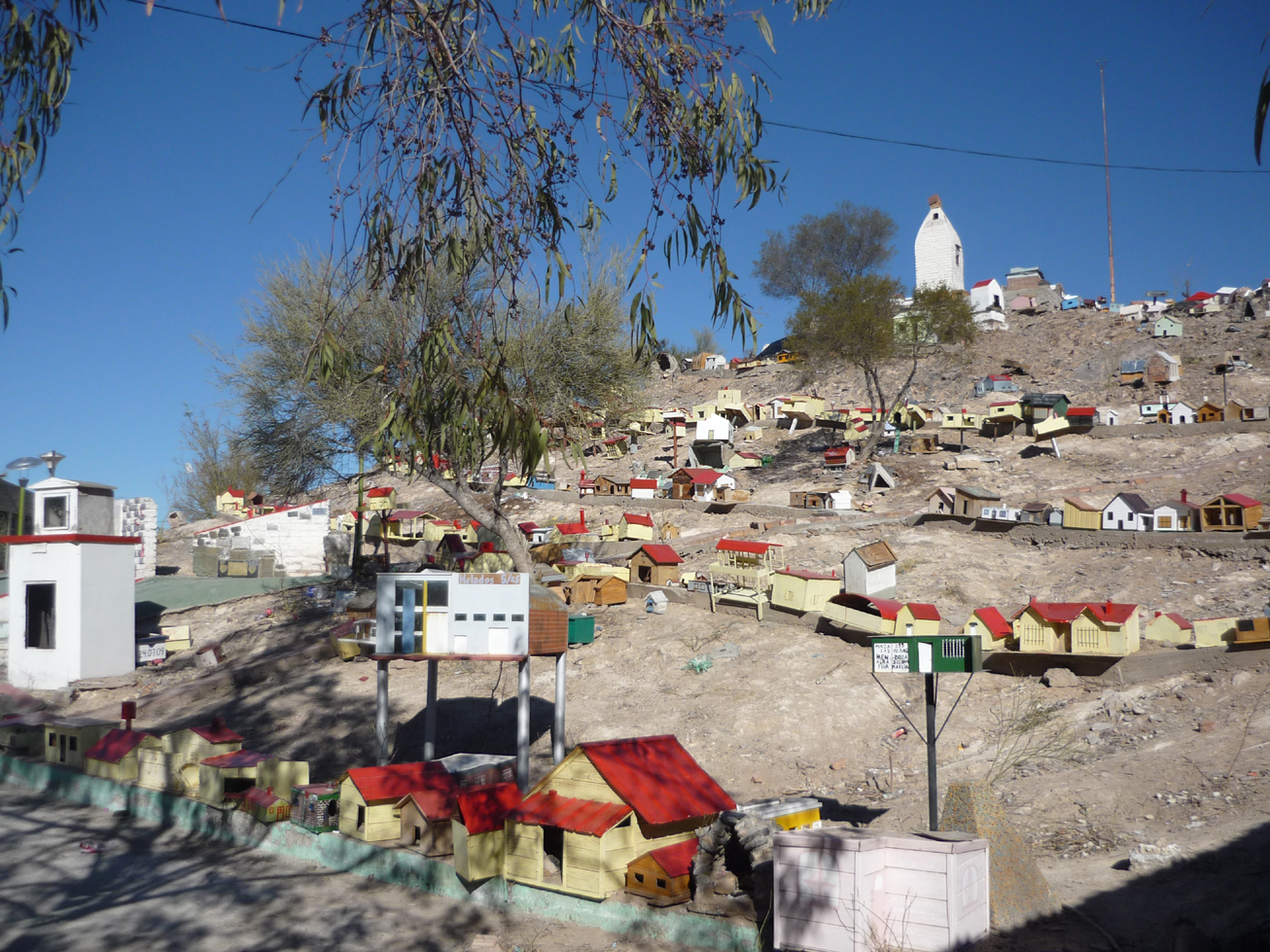 Berg beim Wallfahrtsort Difunta Correa Vallecito